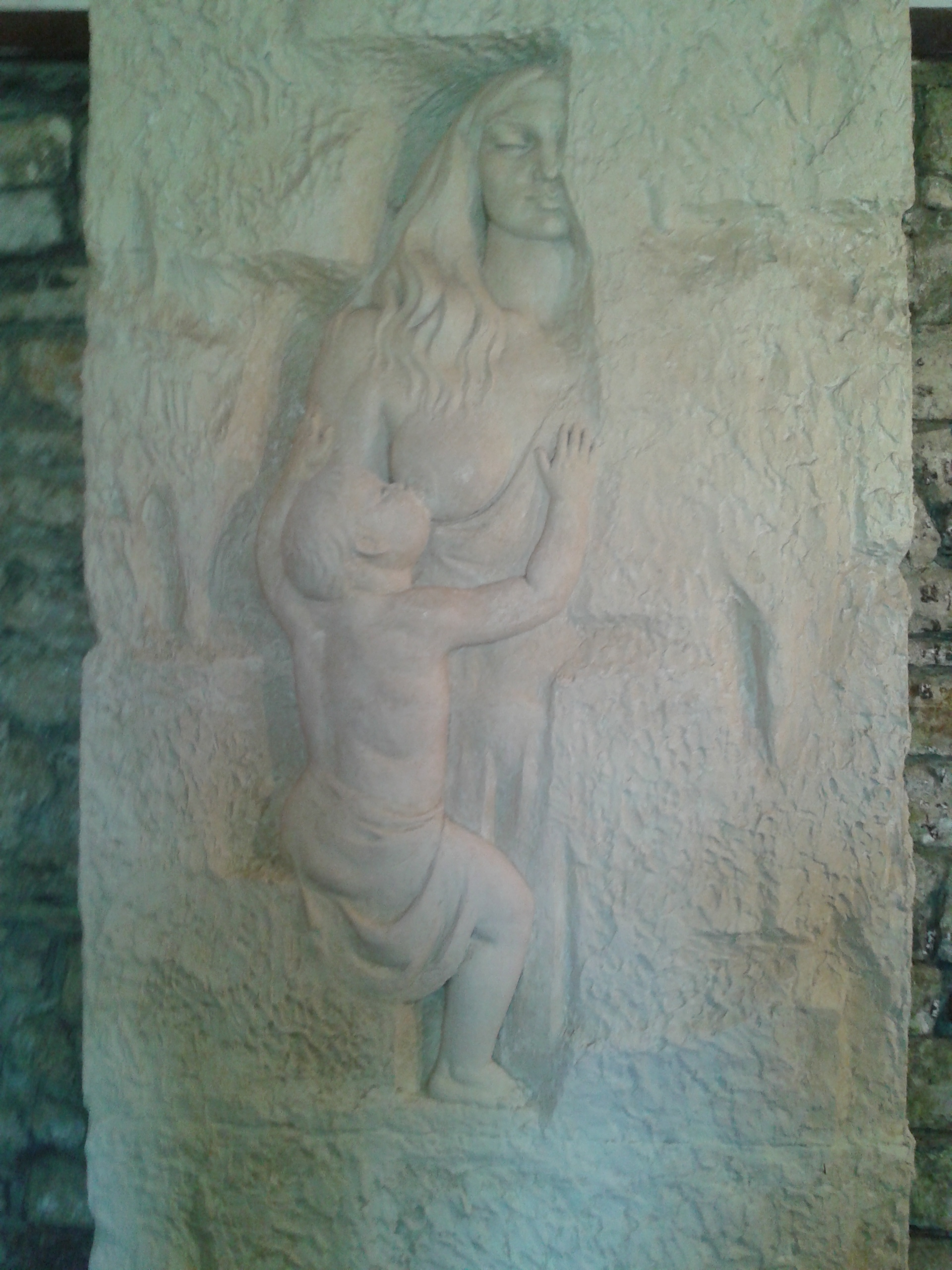 Due to its strategic location, the hill has been settled since antiquity. It was an Illyrian stronghold until it was captured by the Romans in 167 BC.[1] The 19th-century German author and explorer Johann Georg von Hahn suggested that the ancient and medieval city of Shkodër was located immediately south of the Rozafa hill, between the hill and the confluence of Buna and Drin. The fortifications, as they have been preserved to date, are mostly of Venetian origin.[2] The castle has been the site of several famous sieges, including the siege of Shkodra by the Ottomans in 1478 and the siege of Shkodra by the Montenegrins in 1912. The castle and its surroundings form an Archaeological Park of Albaian